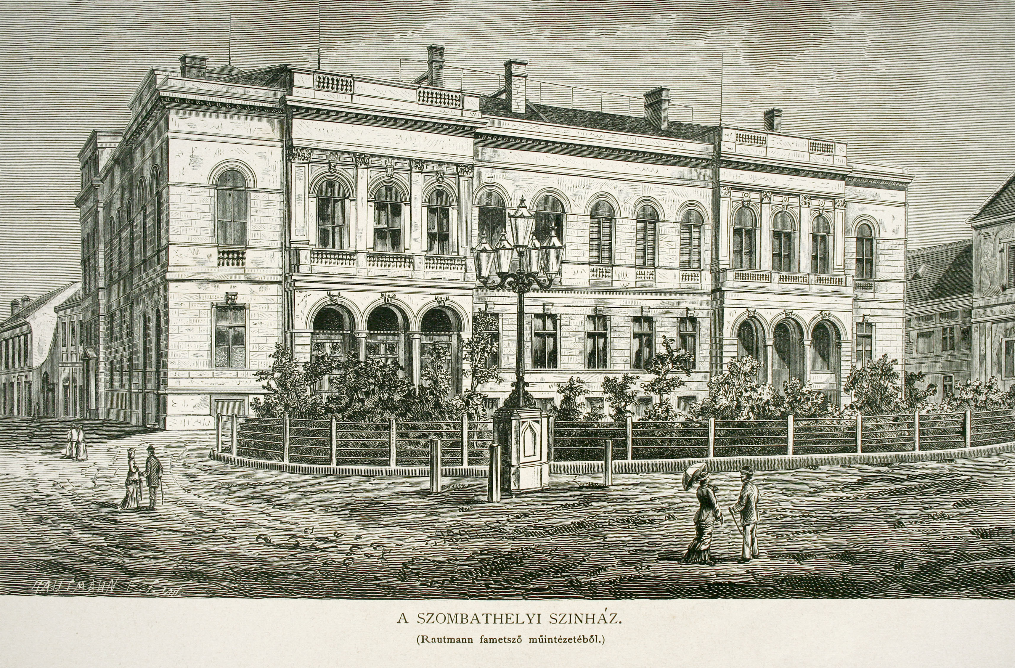 A Szombathelyi Színház épülete 1880.